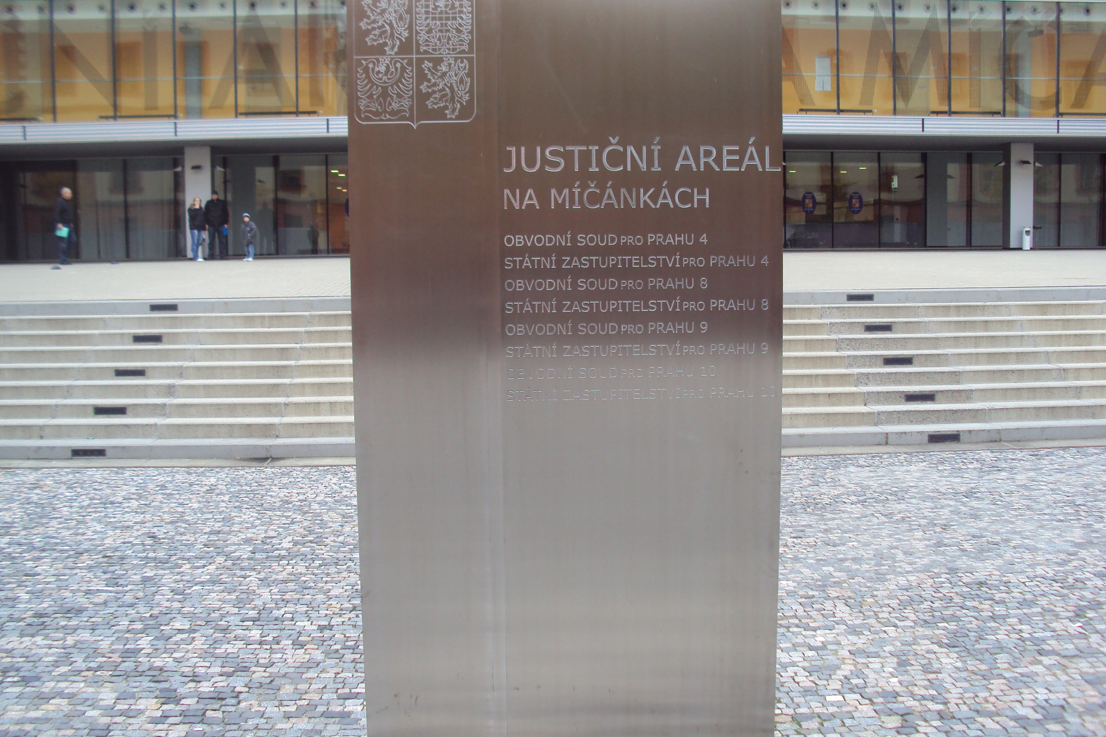 Justiční areál Na Míčankách v Praze 10, Vršovice, deska v areálu na dvoře